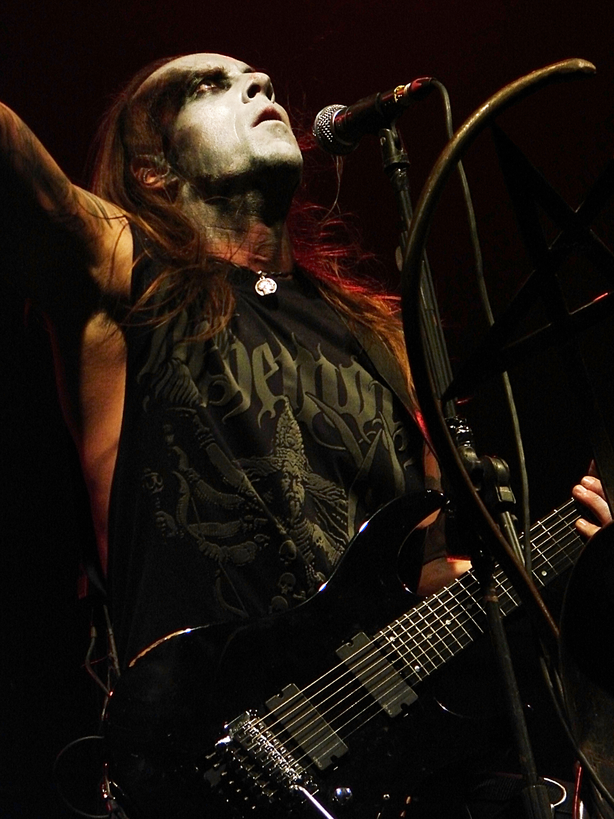 Behemoth en concert à Colfontaine (Belgique), le 07/03/2009: Nergal (Adam Darski).